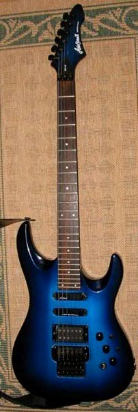 Guitare Aria Po II 450€ d'occaz, 20ans, pas de tige de floyd sur la photo.